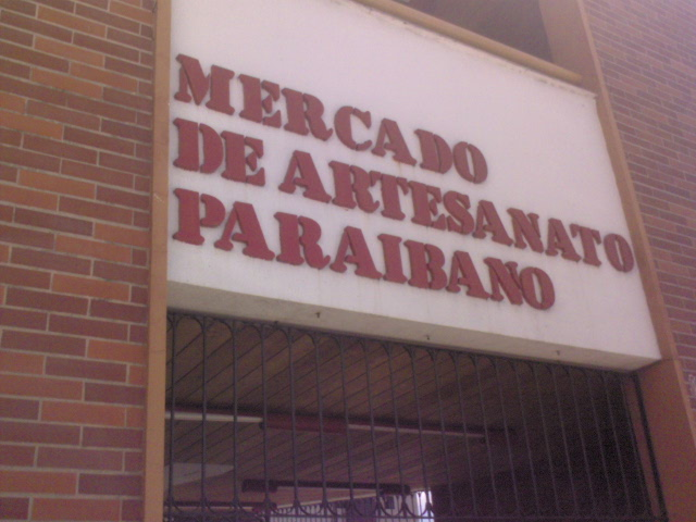 Fachada do Mercado de Artesanato Paraibano